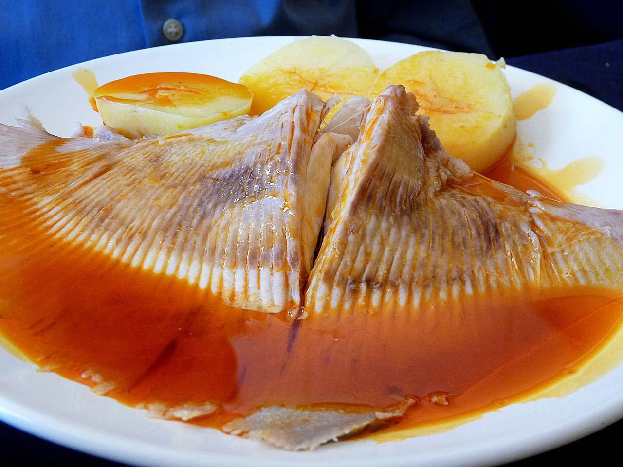 La caldeirada de raia, con raya al medio...obviamente